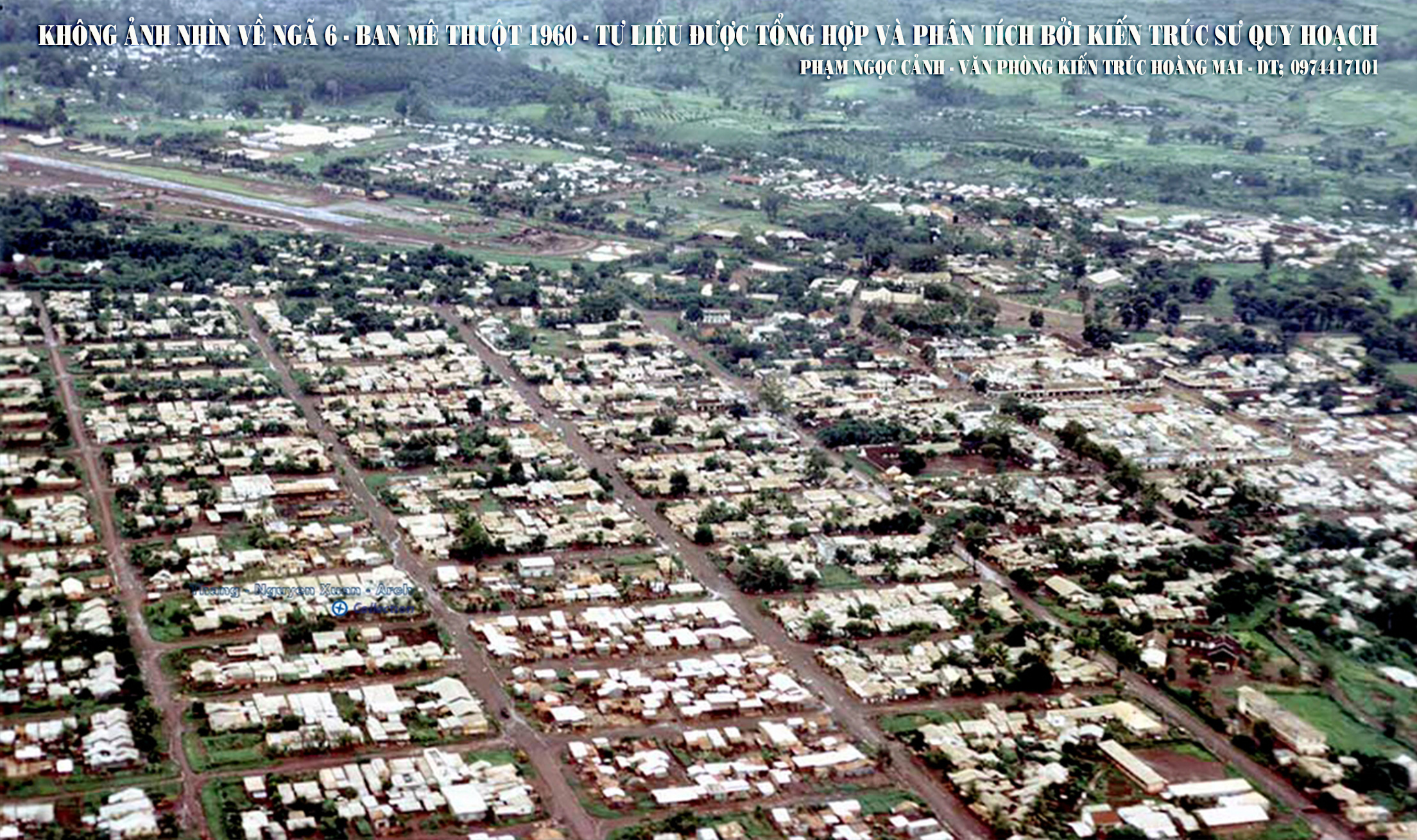 Không ảnh nhìn từ trung tâm về ngã 6 Ban Mê Thuột